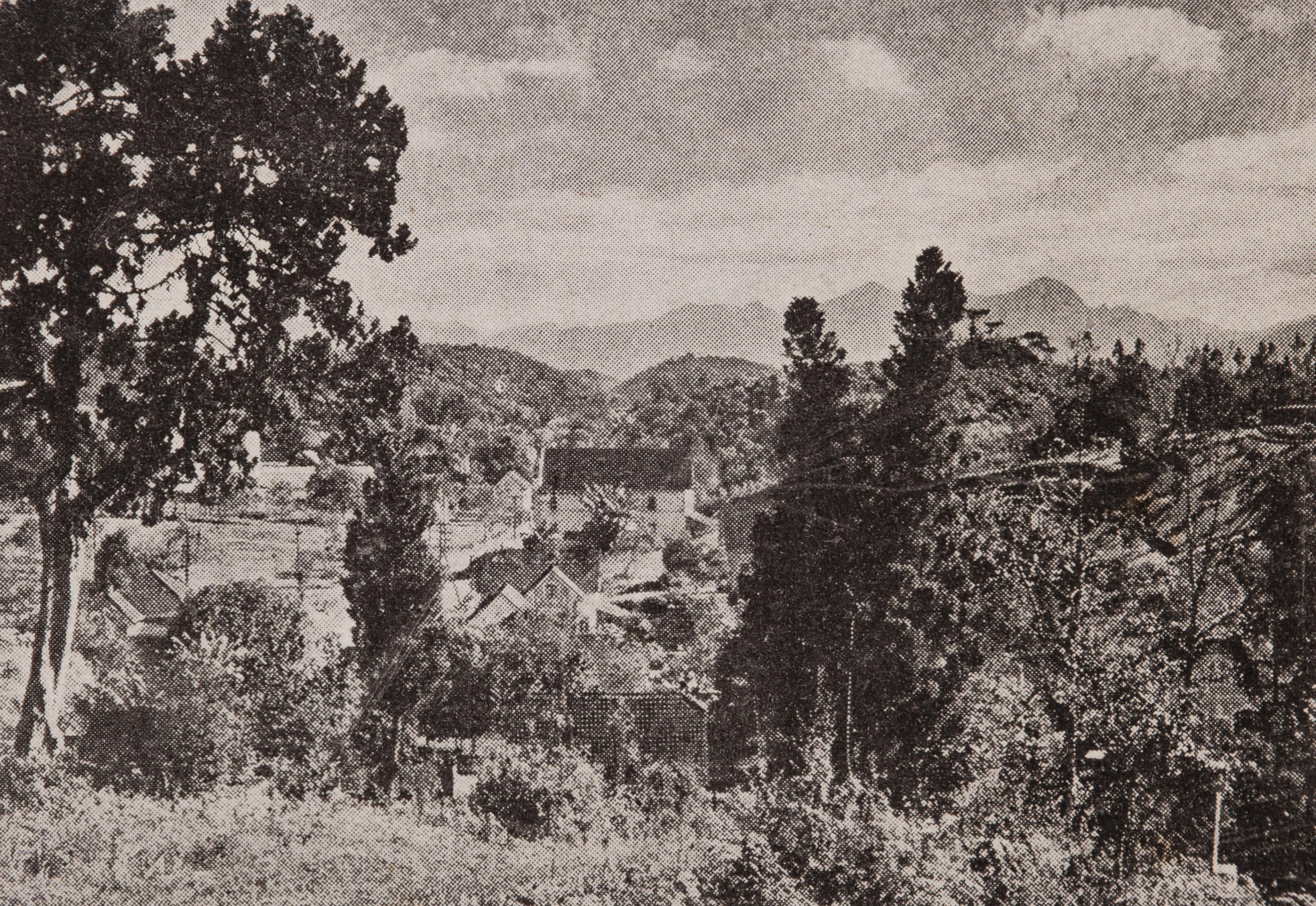 Obra que integra o acervo do Museu Paulista da USP. Coleção João Baptista de Campos Aguirra.